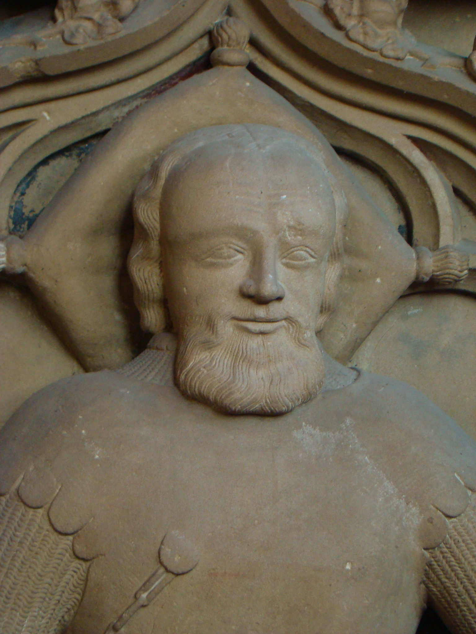 Detail eines Hirschhorn-Grabmals in der Ersheimer Kapelle: Engelhard I. von Hirschhorn